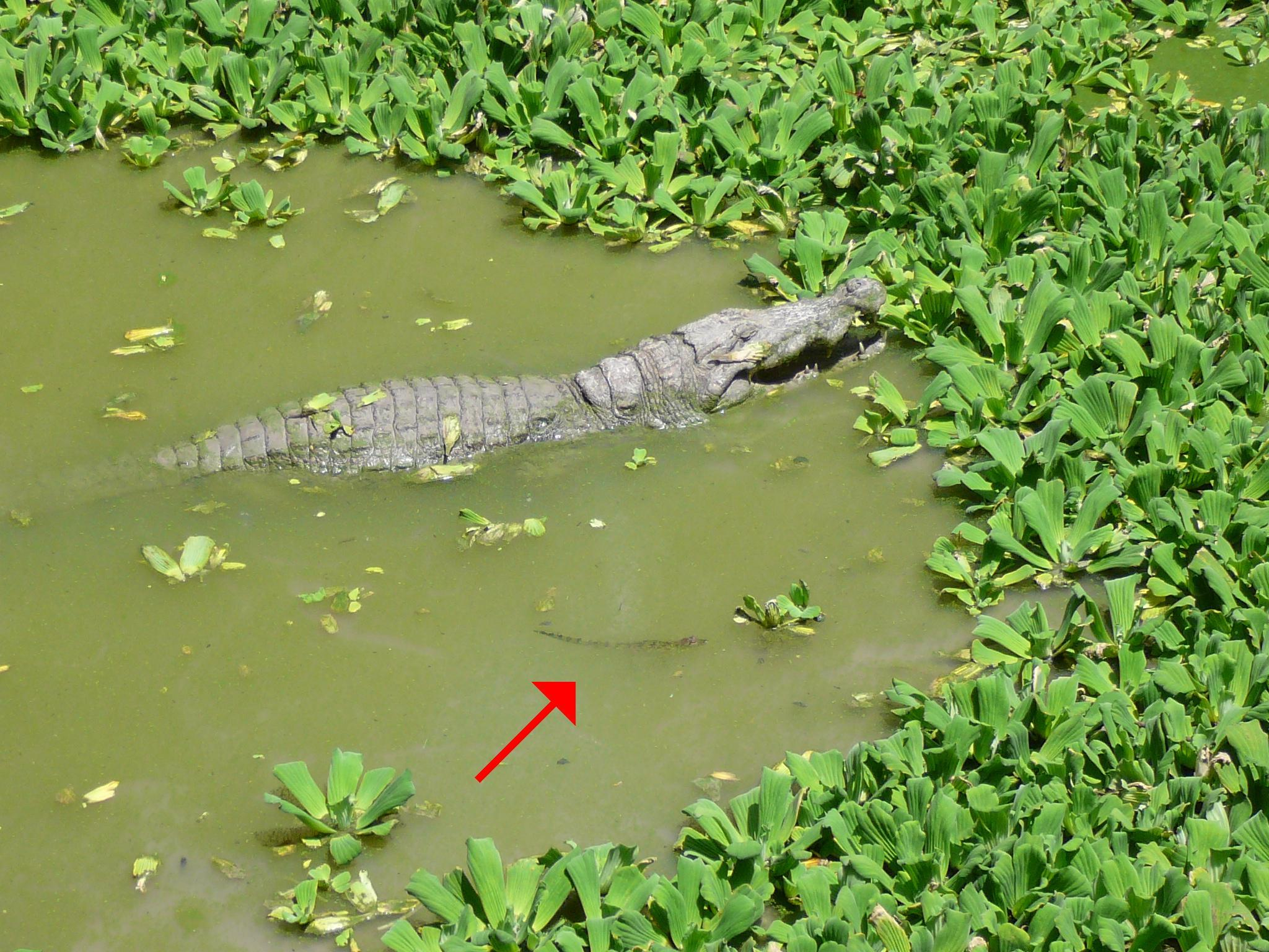 das Heilige Krokodilbecken von Kachikally, Bakau, Gambia